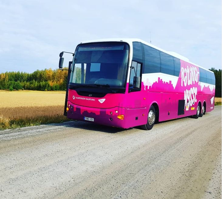 Entinen Netti-Nysse opetusajossa Vesilahdella.